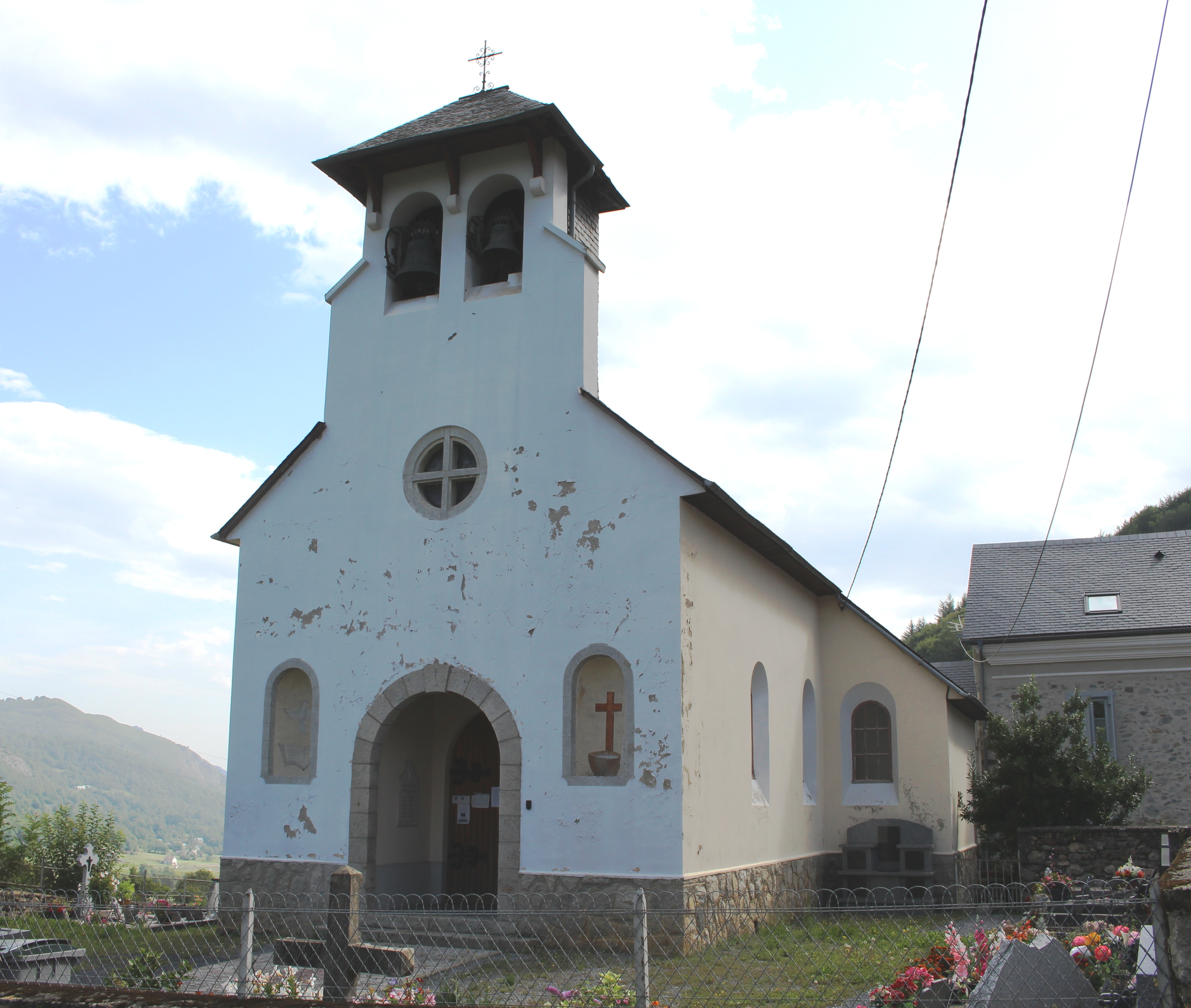 Église Saint-Jean-Baptiste de Sireix (Hautes-Pyrénées)